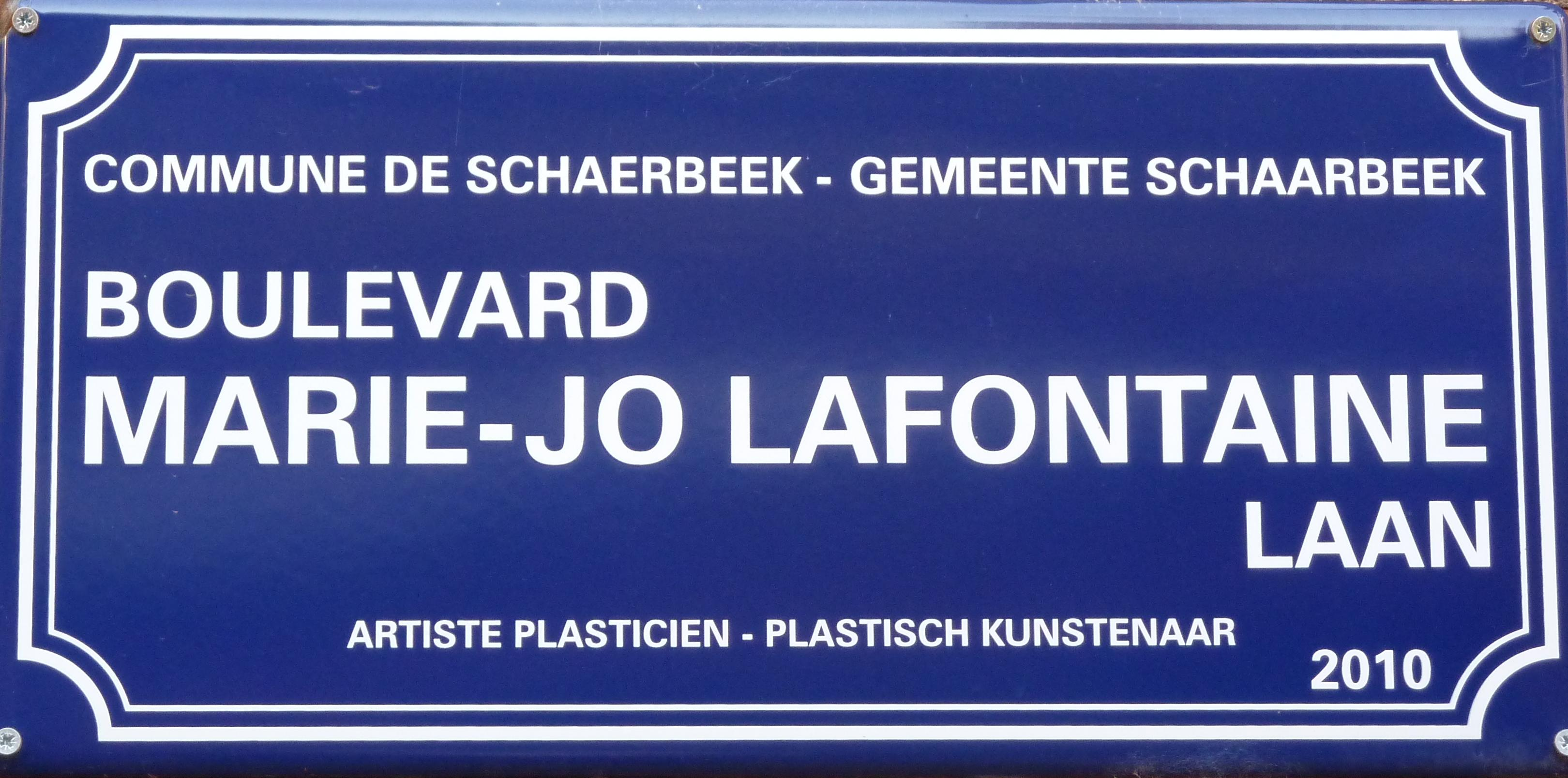 Le Mur des Célébrités à la Maison des Arts de Schaerbeek, Bruxelles, Belgique.